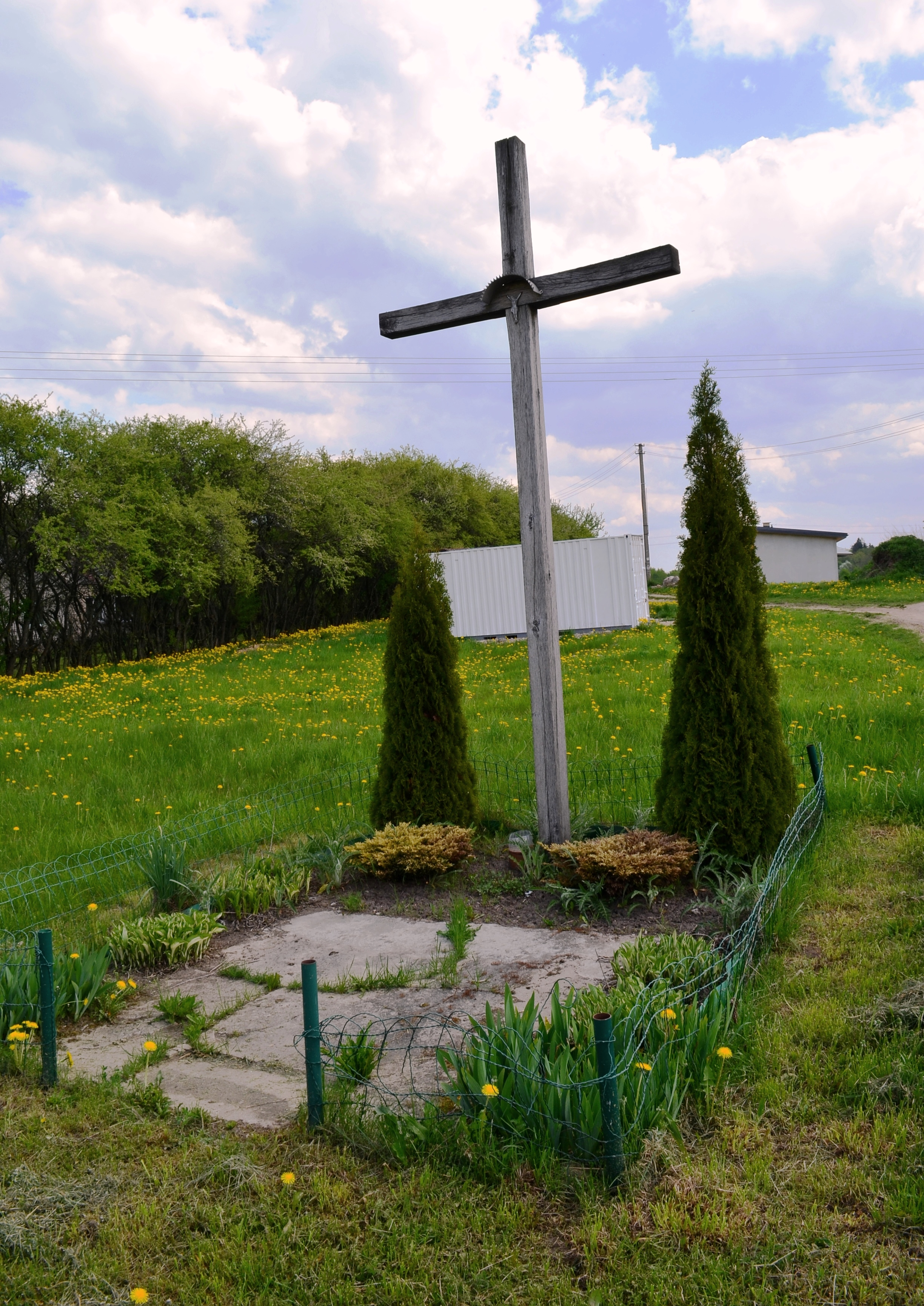 Kryžius, Gudeliai, Maišiagalos sen., Vilniaus raj.